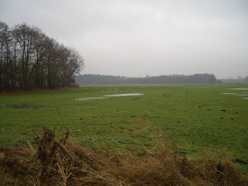 Südostgrenze des Naturschutzgebiets Maibachtal in Mecklenburg-Vorpommern. Blick in die Recknitzwiesen. Blaue Recknitzbrücke im Hintergrund.